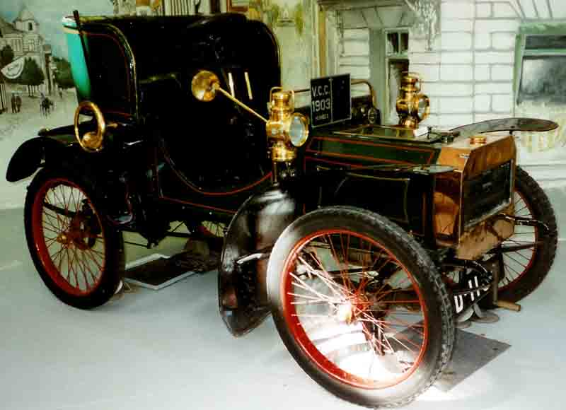 Humber Humberette 5 HP Voiturette 1903 1-cylinder De Dion with automatic inlet valve 5bhp D1181 Arvika Car Museum, Sweden